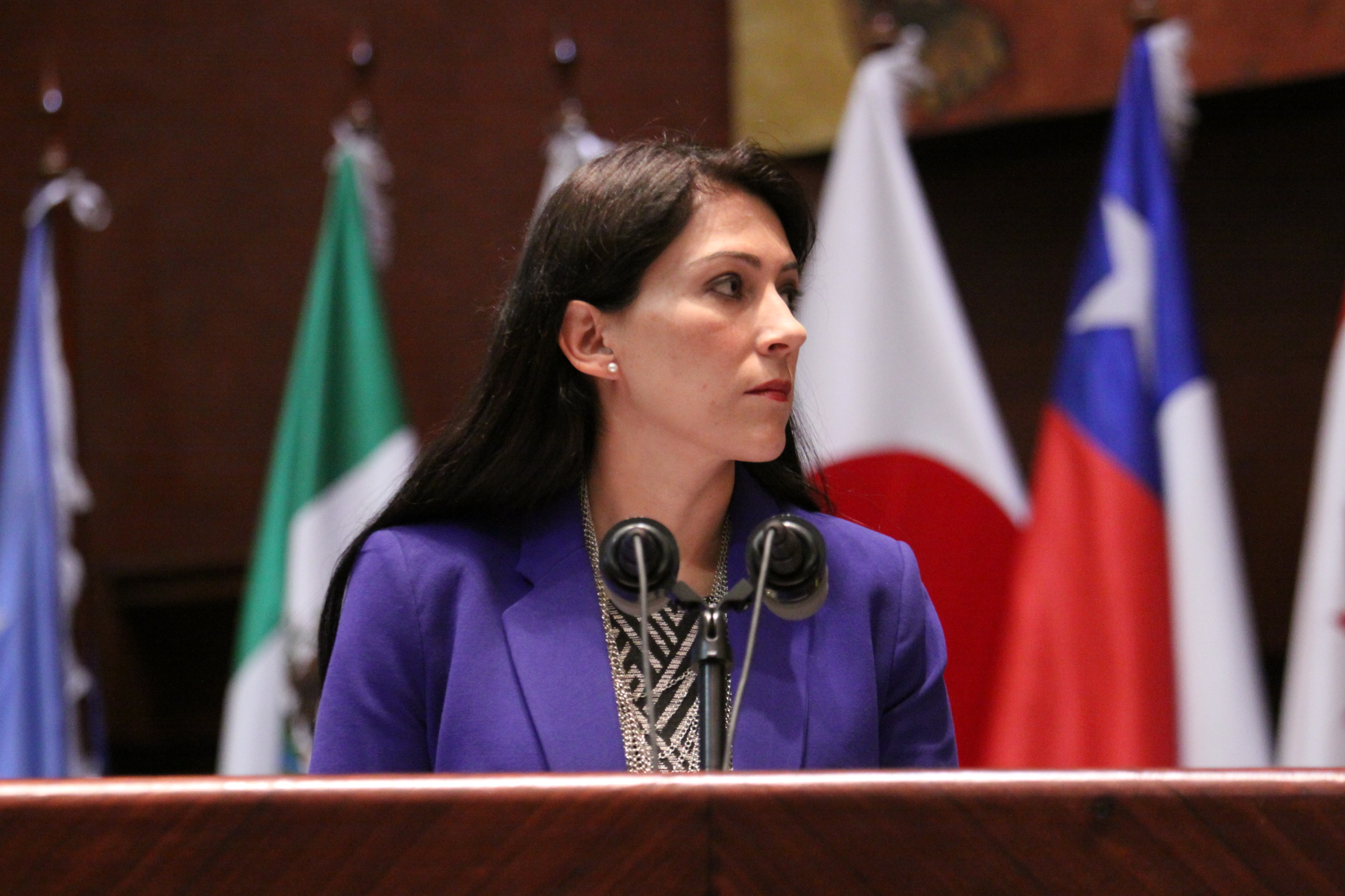 Quito, 13 enero de 2015.- Libia Rivas, secretaria General de la Asamblea Nacional del Ecuador da apertura de las jornadas del día en el Foro Parlamentario Asia Pacífico Fotografía: Hugo Ortiz / Asamblea Nacional